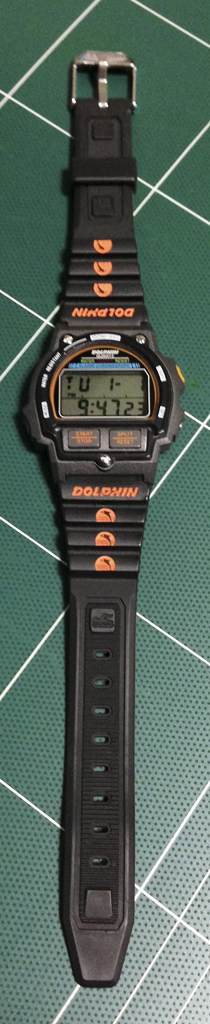 대한민국 시계 브랜드인 돌핀의 MRP 567-7 모델(전체적인 모습).